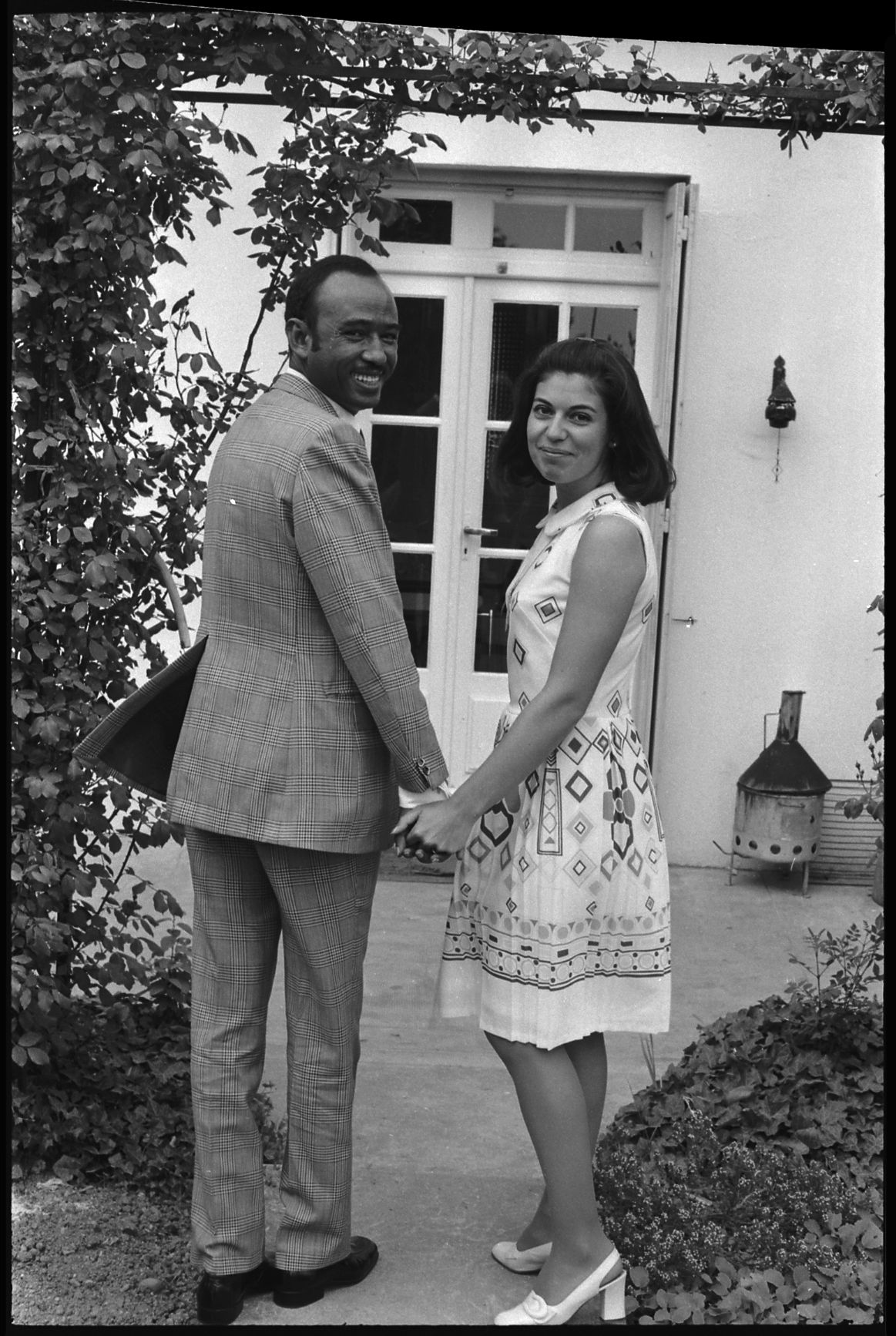 Carcassonne (Aude). 14 Mai 1971. Vue de Régine Soulé et d'Ali Aref à la veille de leur fiançailles.